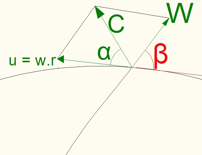 Resultante vectorial C de dos fuerzas actuantes en la periferia de un rodete de bomba centrífuga